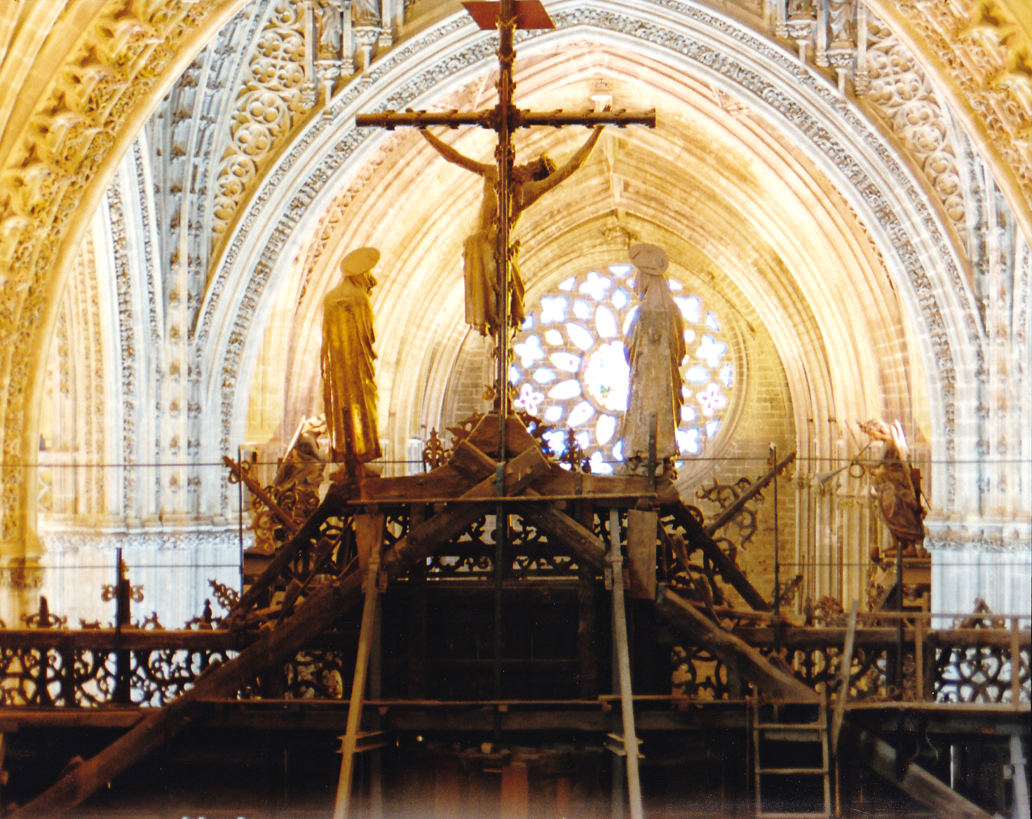 Detalle del Calvario que corona el Retablo de la Catedral de Sevilla